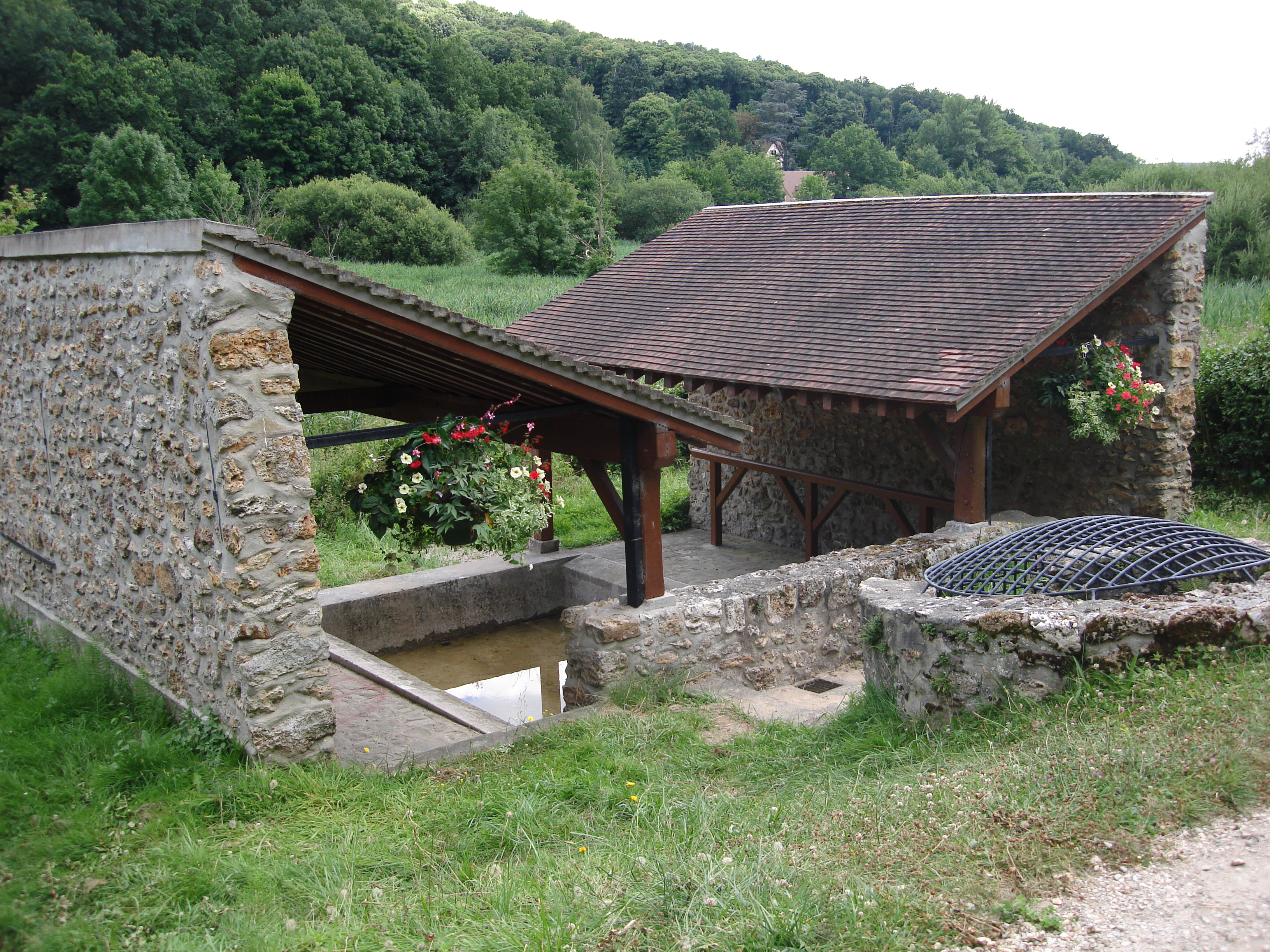 Lavoir à Villiers le Bacle